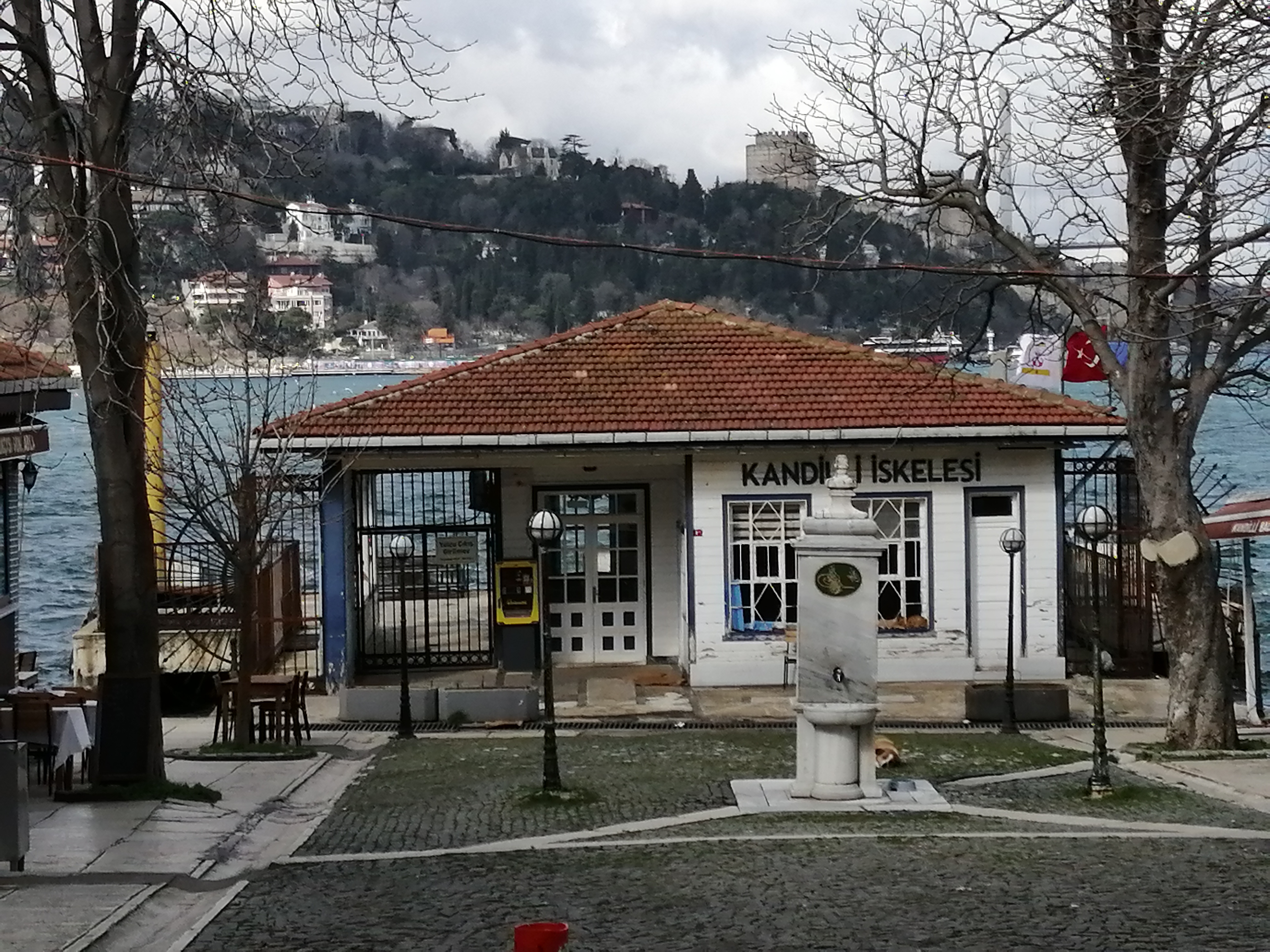 Kandilli İskelesi'nin ön yüzü